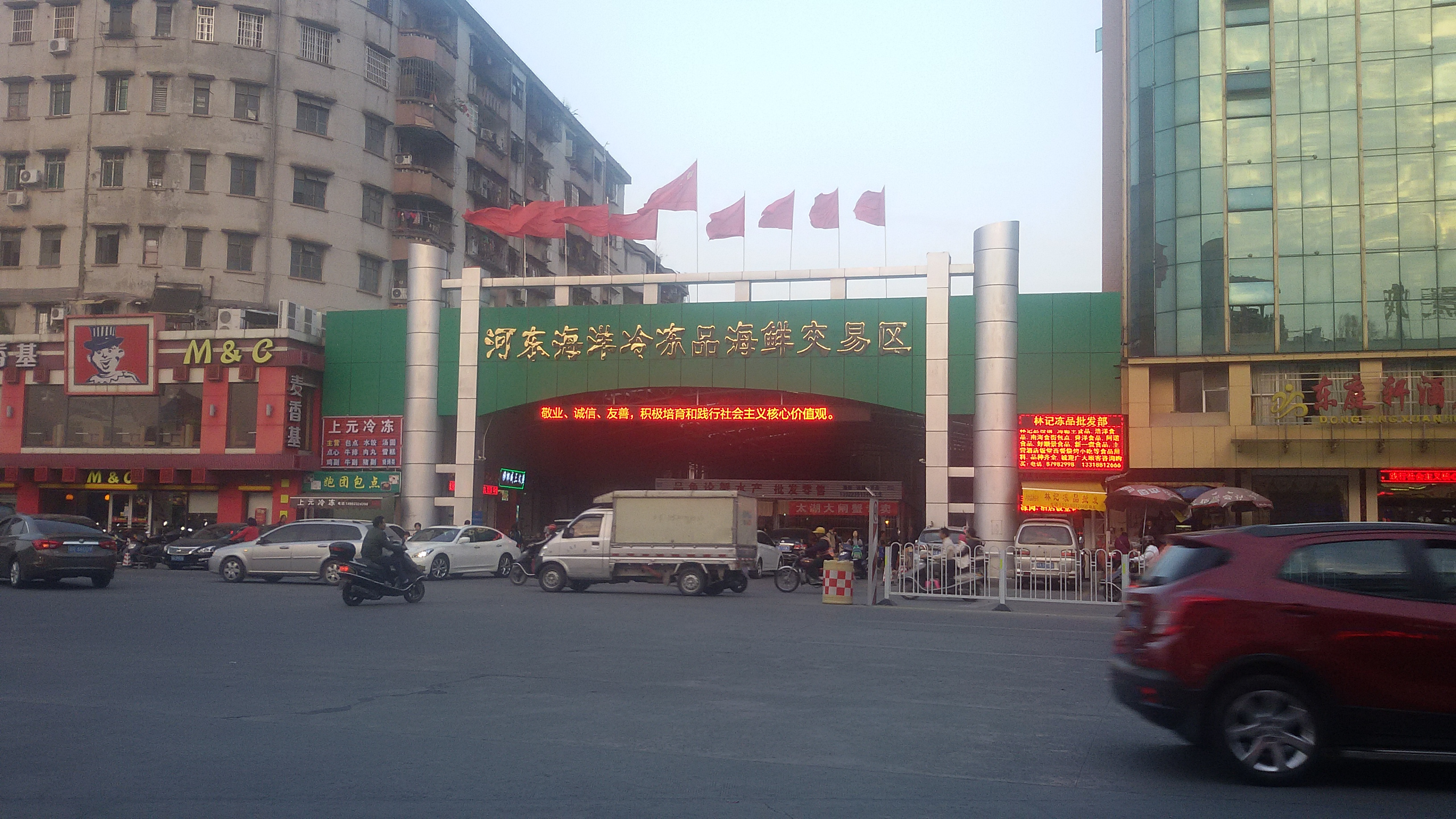 粵語: 河东海洋冷冻品海鲜交易区